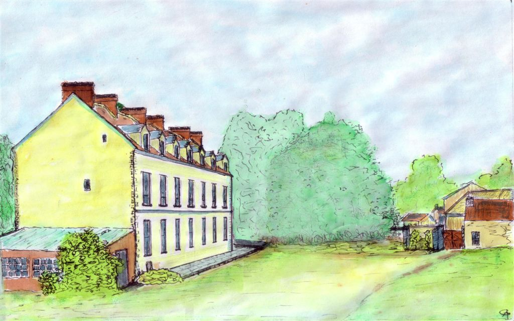 Demeure seigneuriale du XVII-XVIIIe siècle (entre 1609 et 1722). Croquis colorisé, d'après plan et carte postale ancienne.